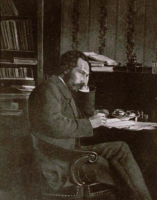 Le Professeur Kœberlé en 1862. Revue alsacienne illustrée, 1910. Bibliothèque nationale et universitaire de Strasbourg